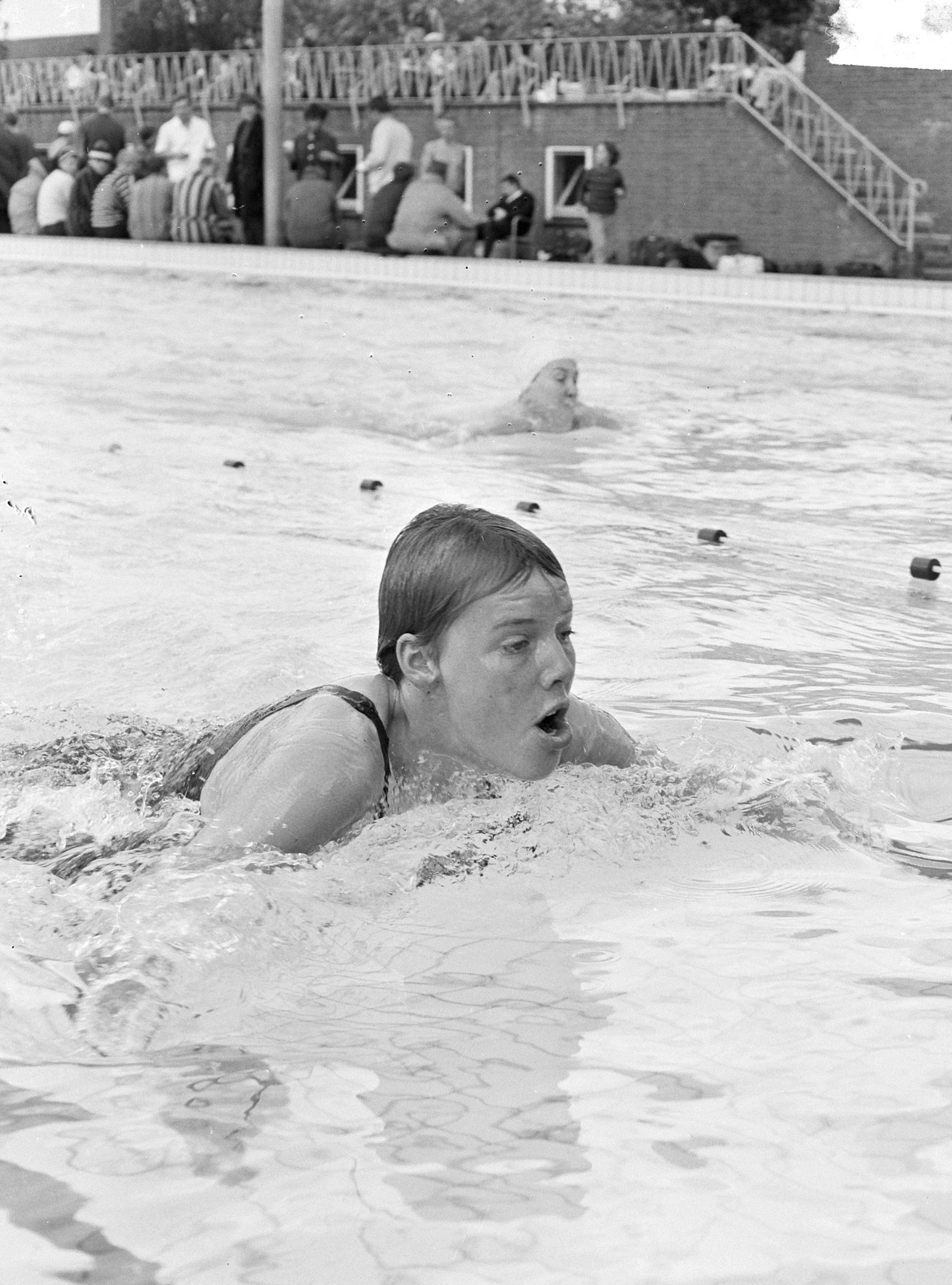 Internationale zwemwedstrijden te Nijmegen, Truus Looys